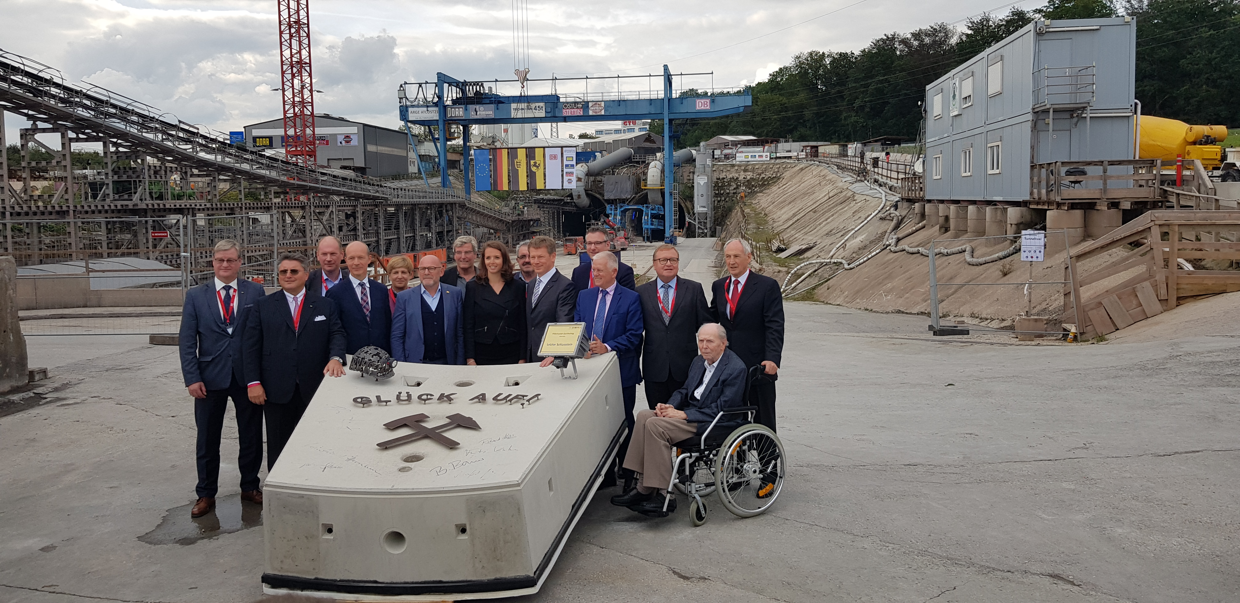 Prominenz vor dem symbolischen Schlussstein des Fildertunnels, anlässlich der Feier zum Ende dessen Maschinenvortriebs am 9. September 2019.